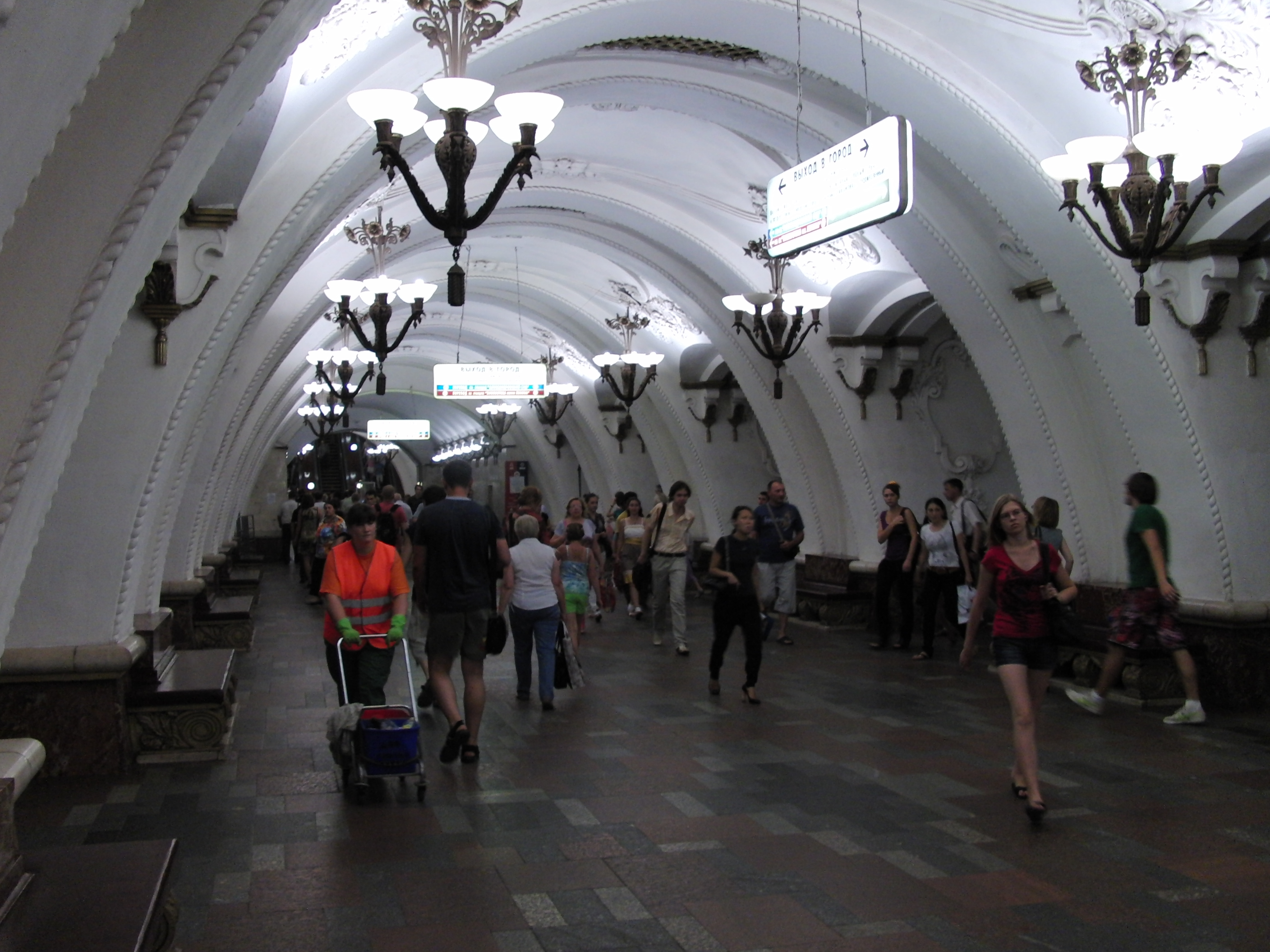 Arbatskaya - APL (Арбатская - АПЛ)